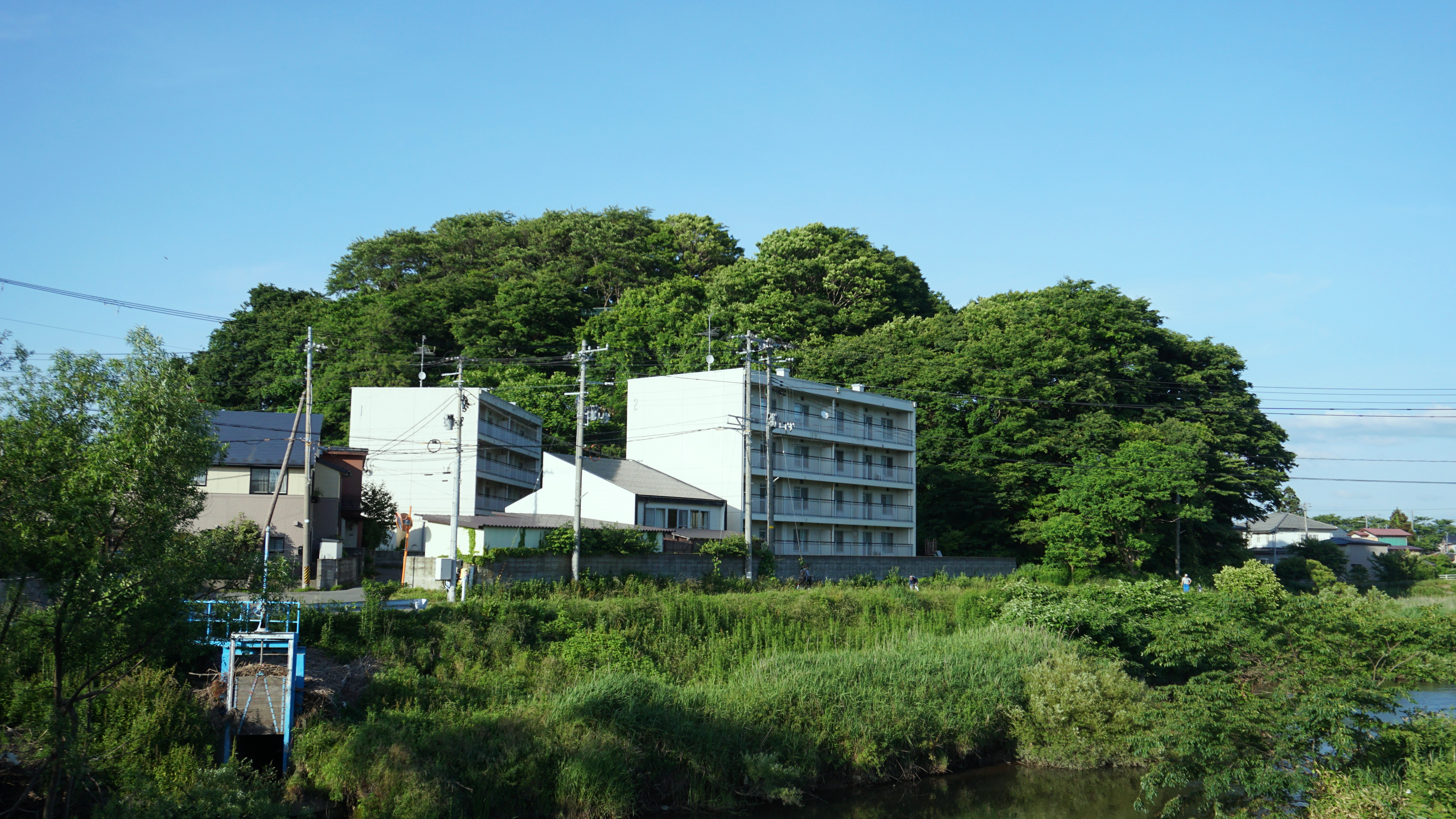 秋田市にある富士山（明田富士）。全国各地の富士山を名乗る山の中で最も標高が低い。